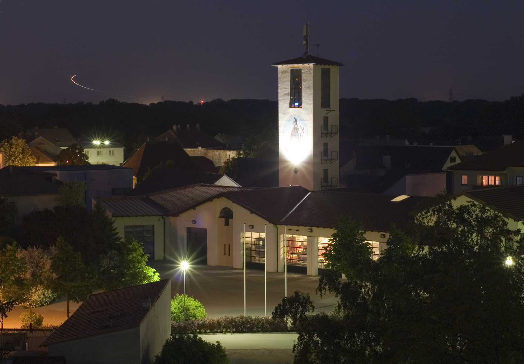 Gebäude der FF Traiskirchen-Möllersdorf bei Nacht ( 4